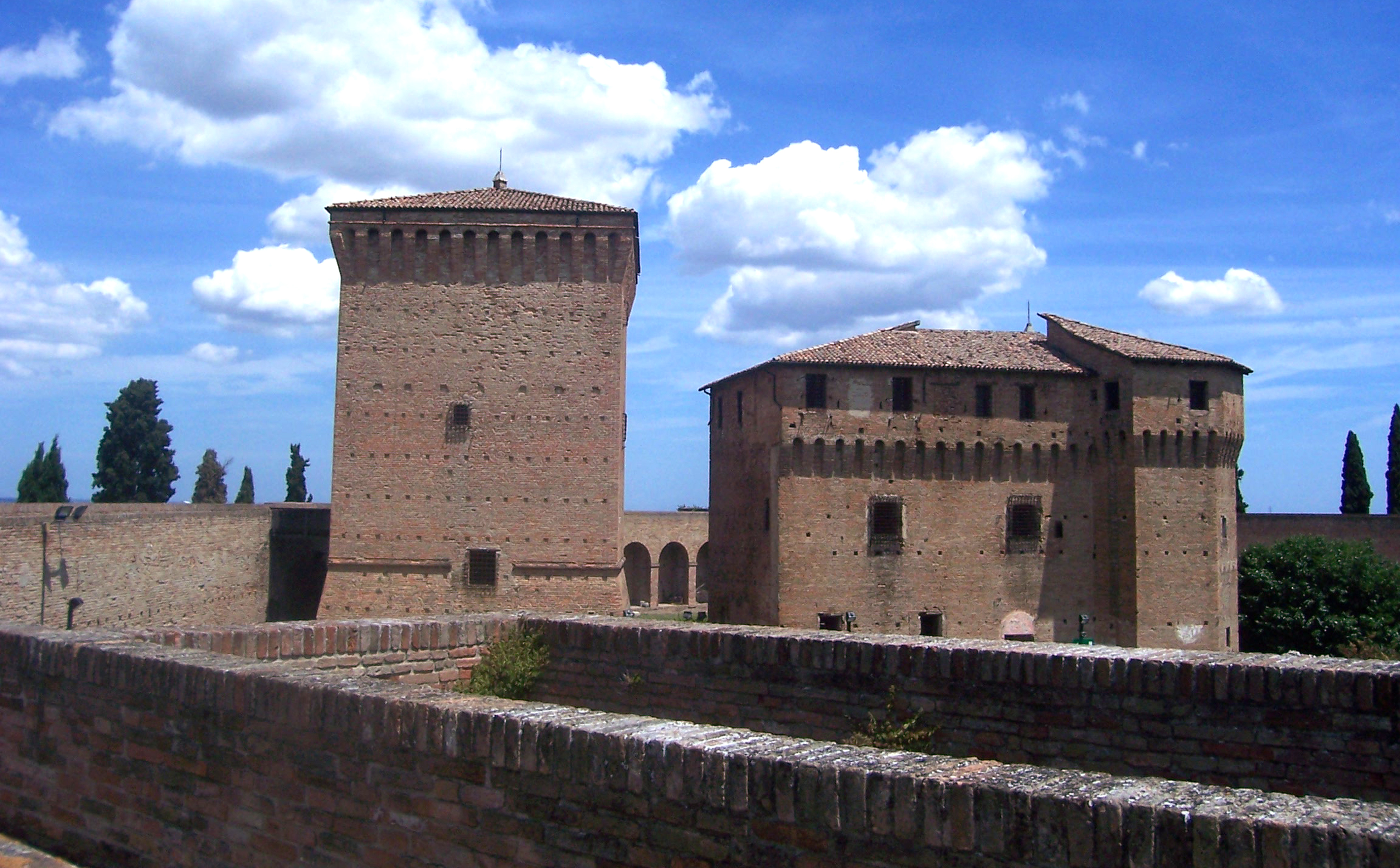 La Rocca Malatestiana di Cesena vista dagli spalti